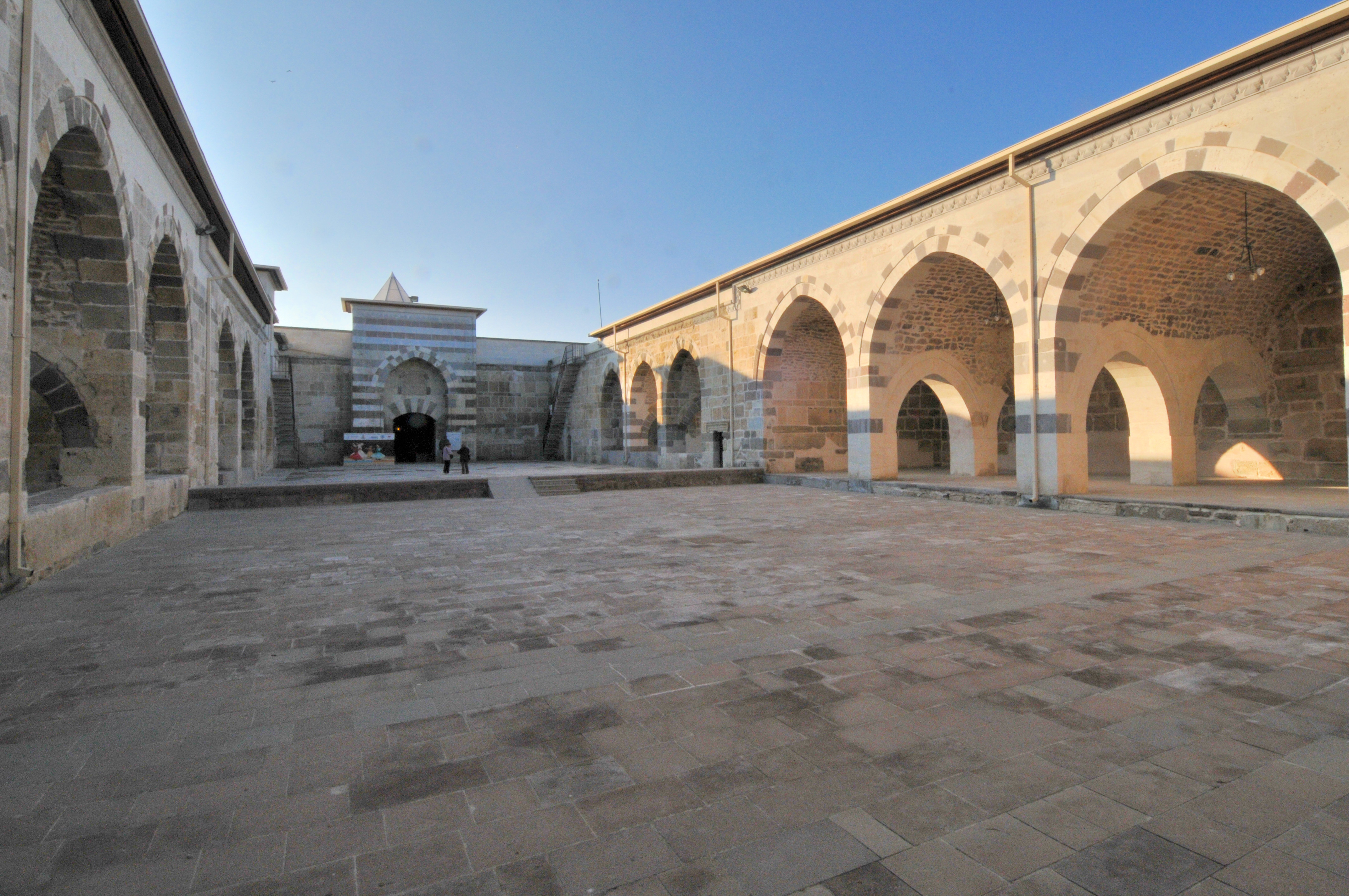 Caravanserail Turquie